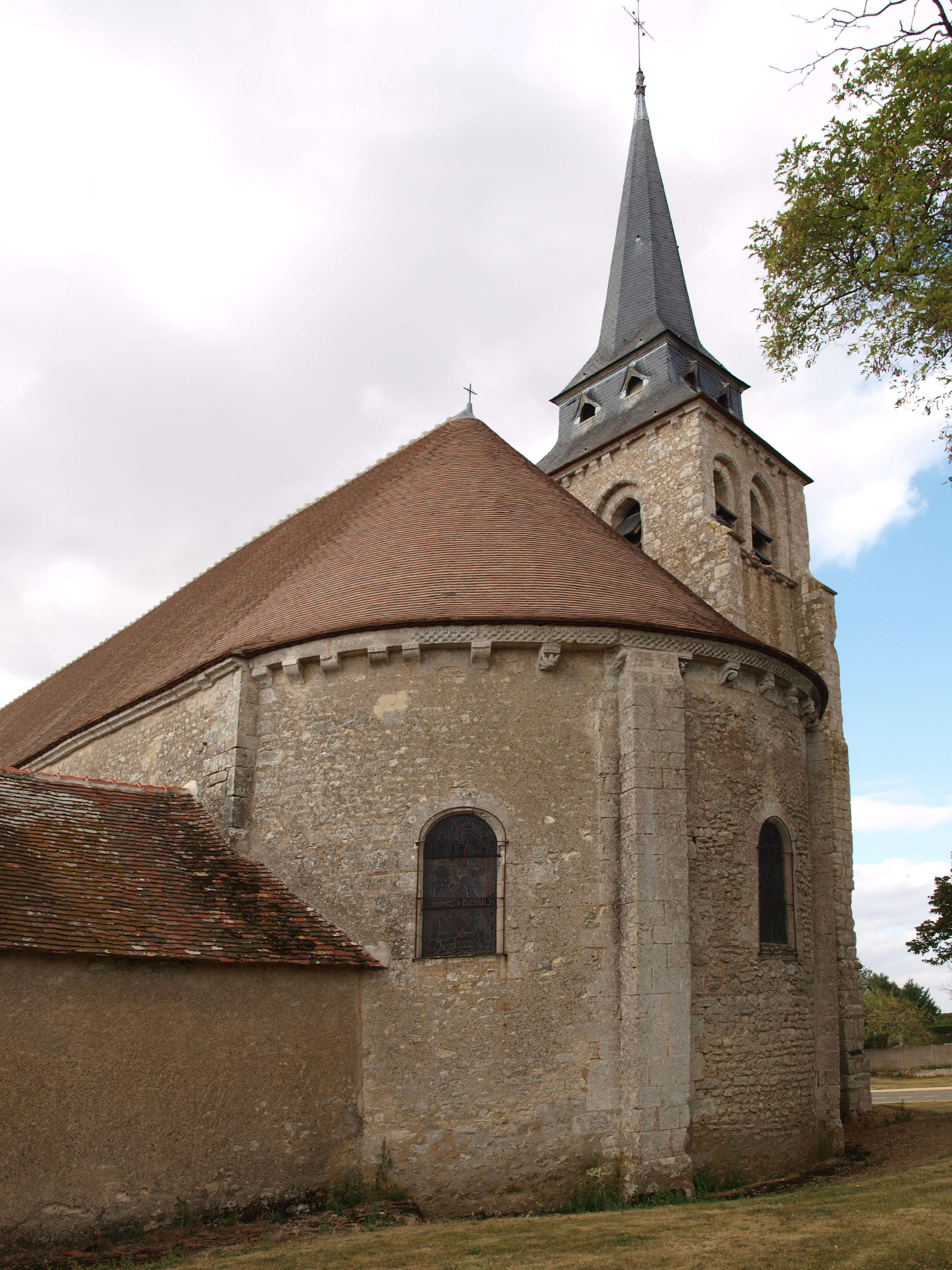 Lutz-en-Dunois (Eure-et-Loir)